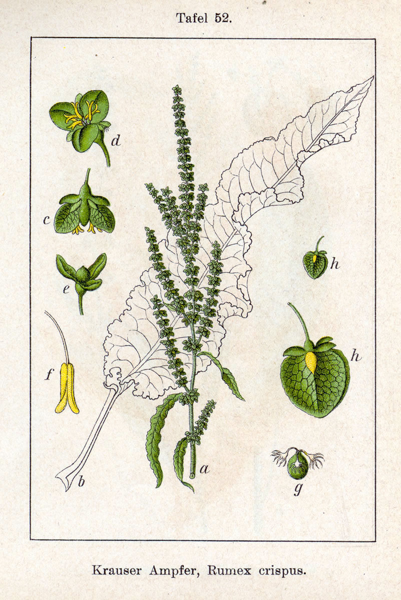 Rumex crispus L. Original Description Krauser Ampfer, Rumex crispus